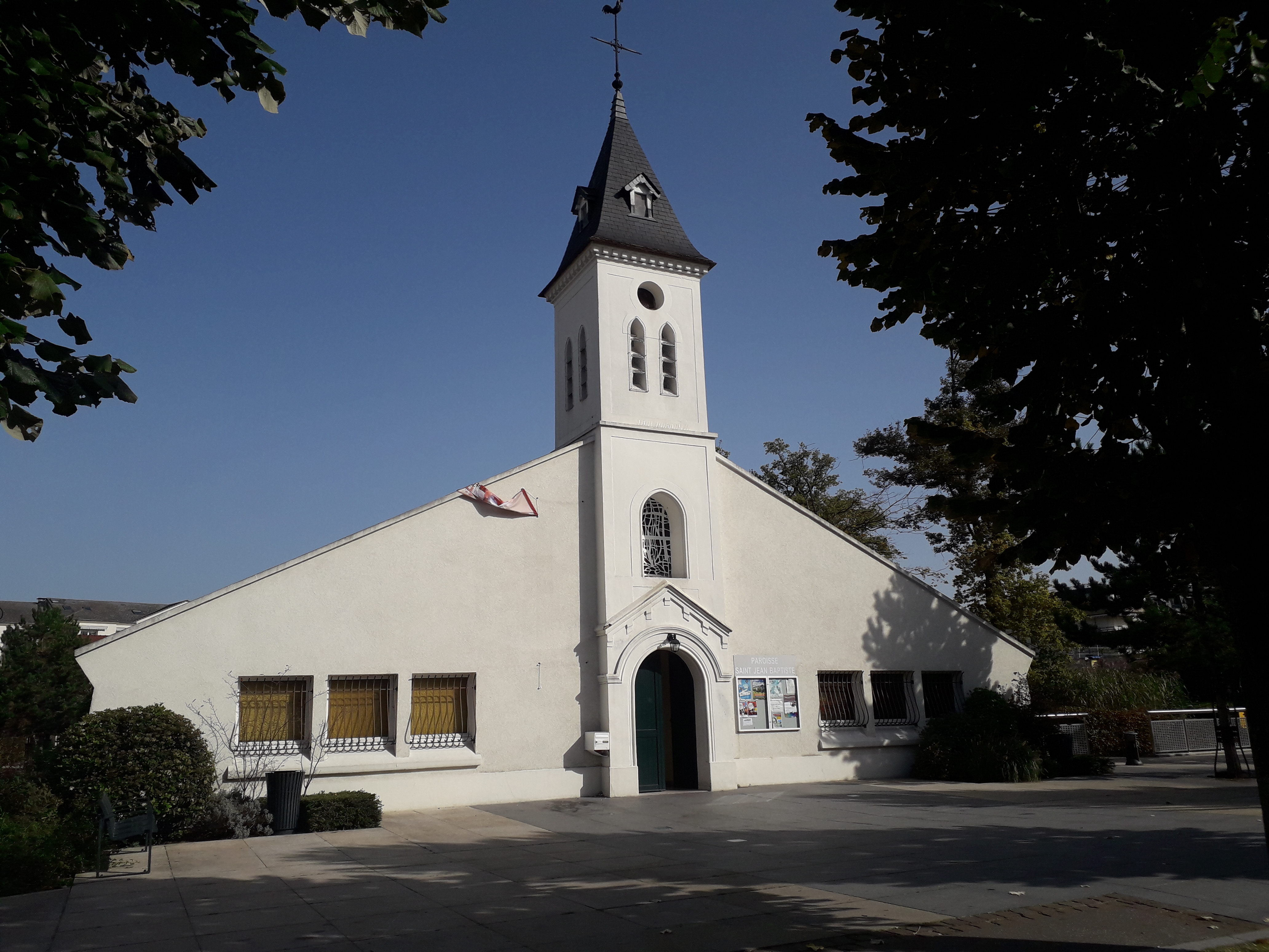 Vue de la façade de l'église paroissiale Saint Jean Baptiste, avenue Ardouin, Le Plessis-Trévise (Val-de-Marne, France).